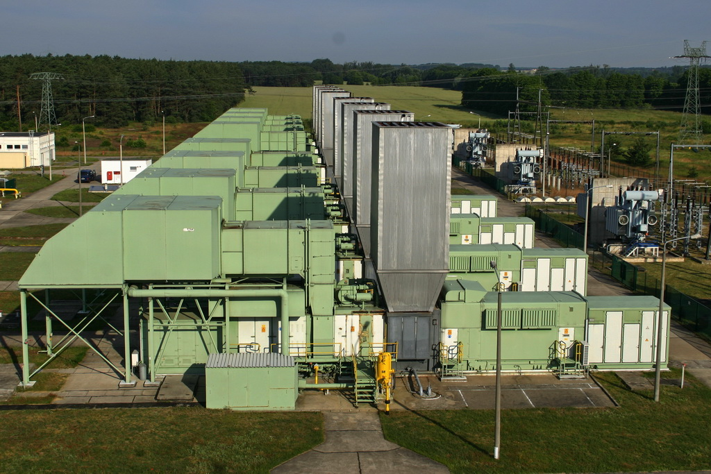 General Electric MS6001B Gasturbinen A3-H3 im Kraftwerk Thyrow Unknown